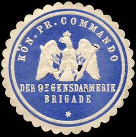 Sealing stamp Title: Königlich Preussische Commando der 9t Gensdarmerie Brigade Description: blau, weiß, geprägt Place: size: 4 cm